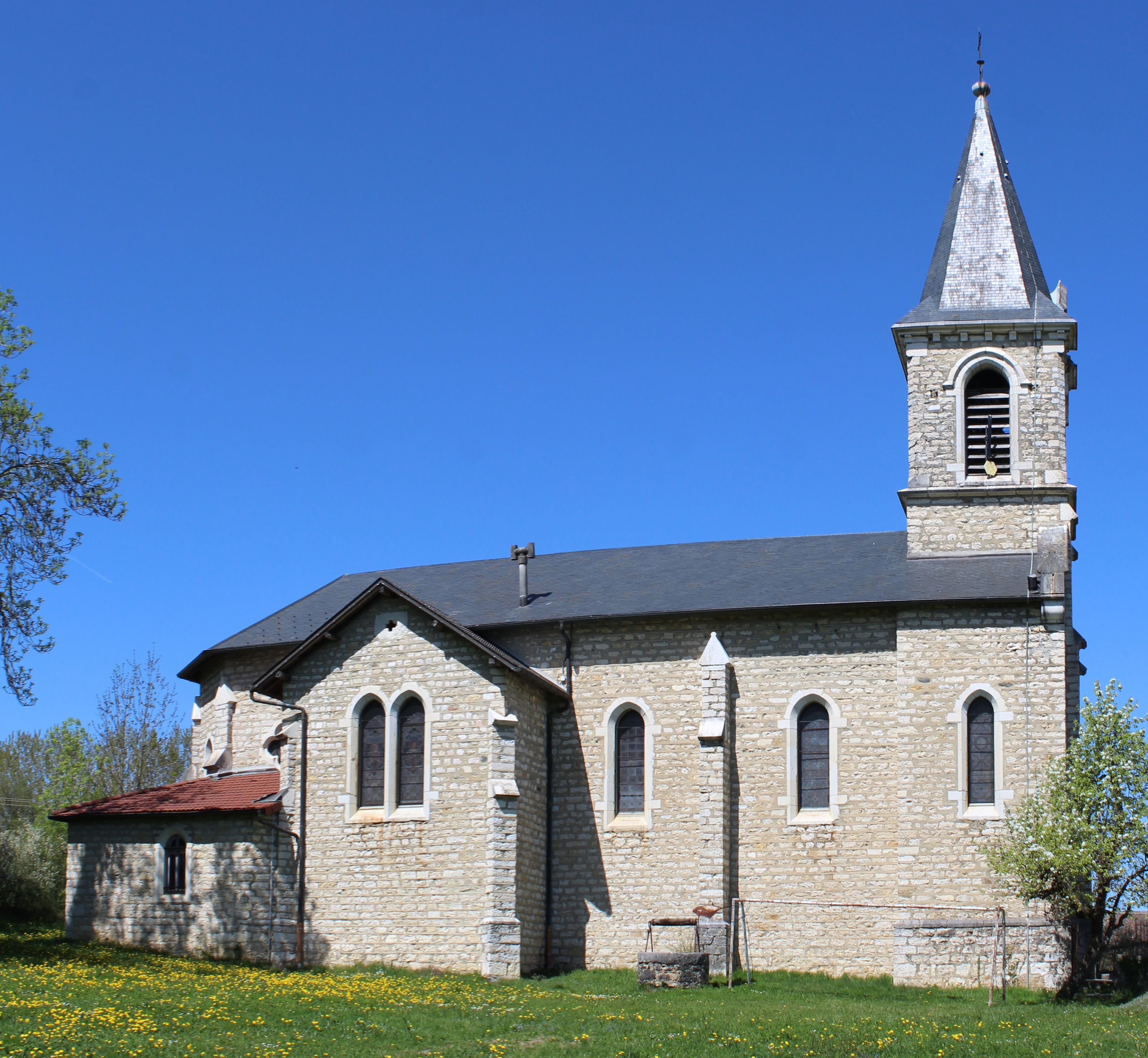 Église Saint-Pierre de Parves, Parves-et-Nattages.